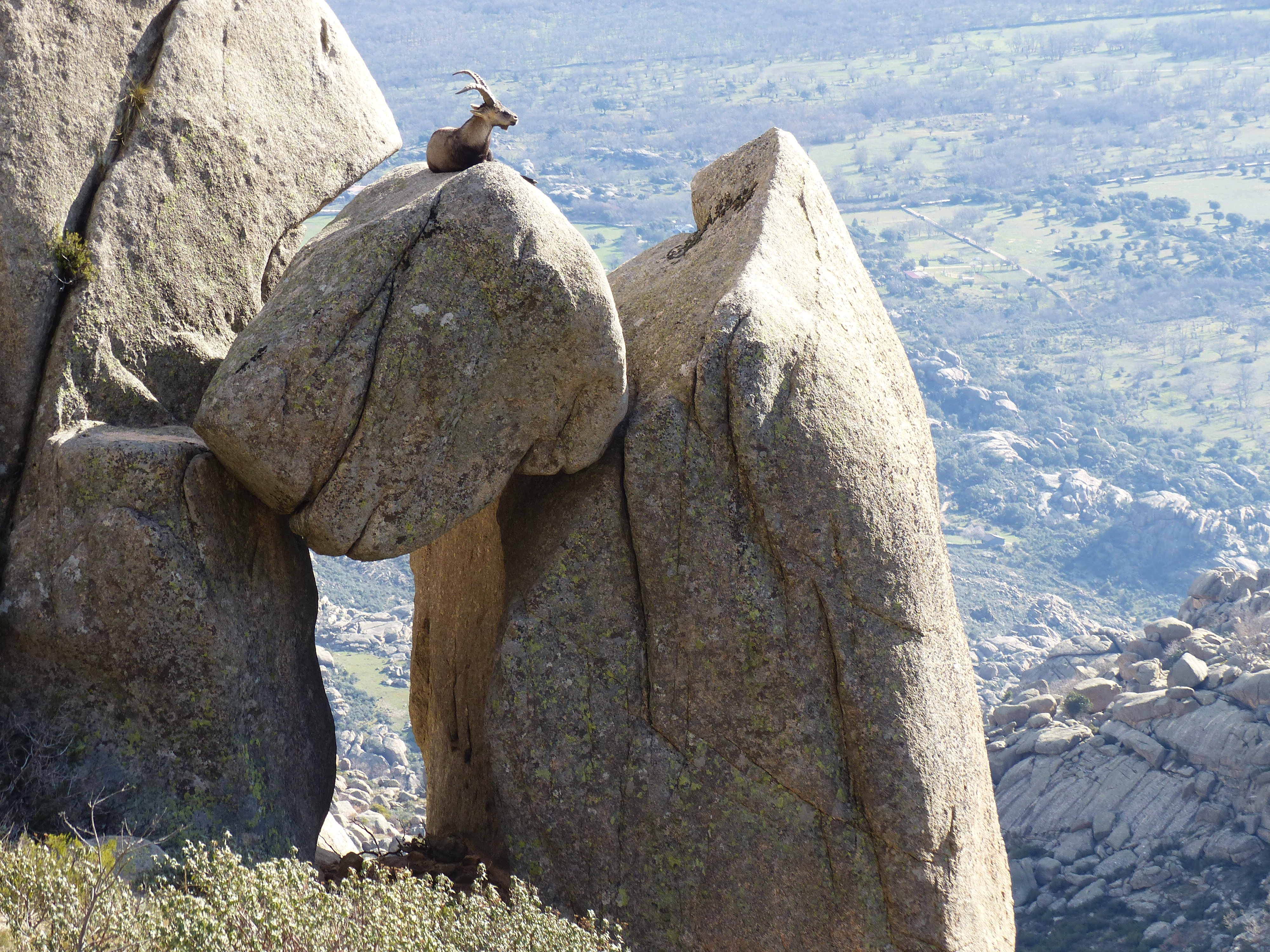 Capra pyrenaica, La Pedriza